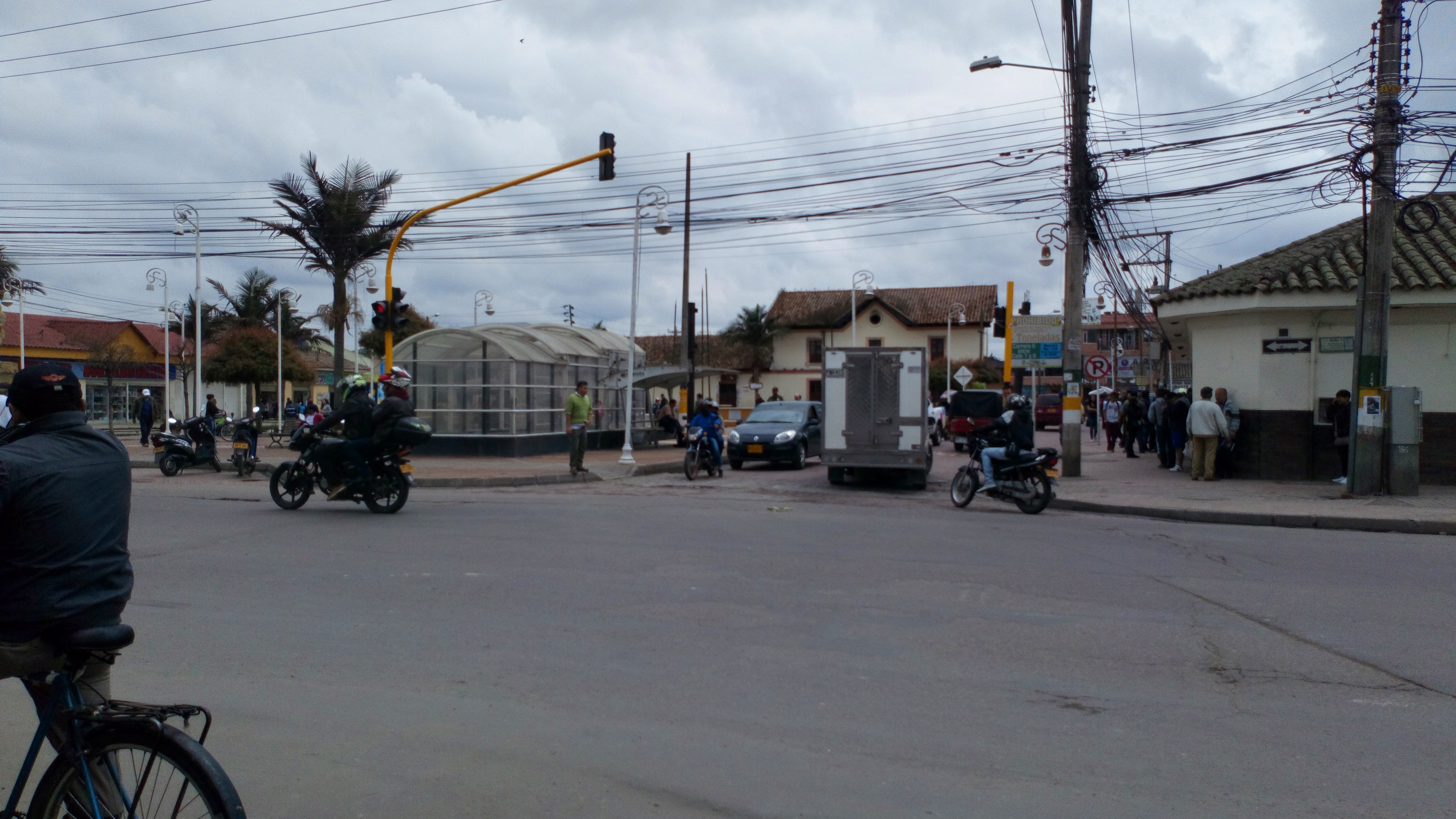 Parque Principal de Madrid